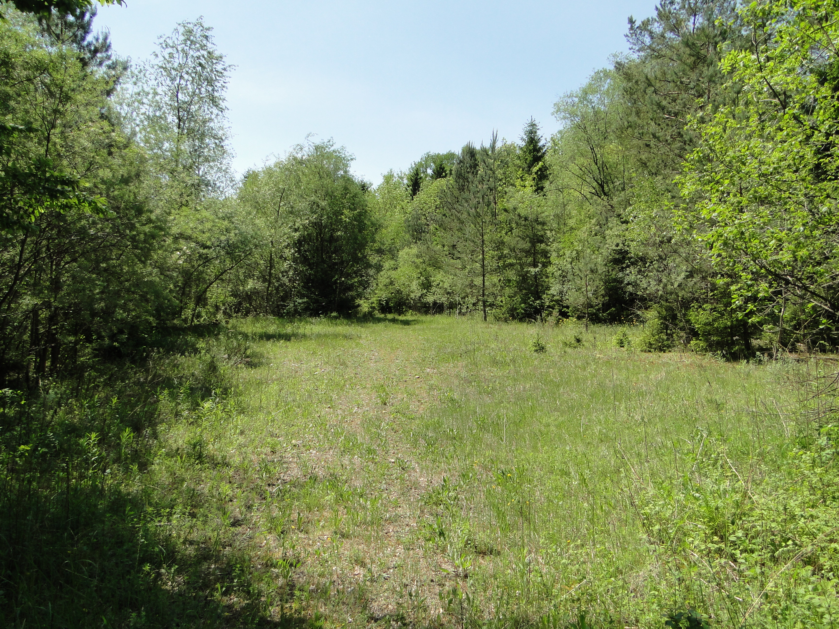 Rohbodenfläche, Naturschutzgebiet Kiesgrube Aitrach